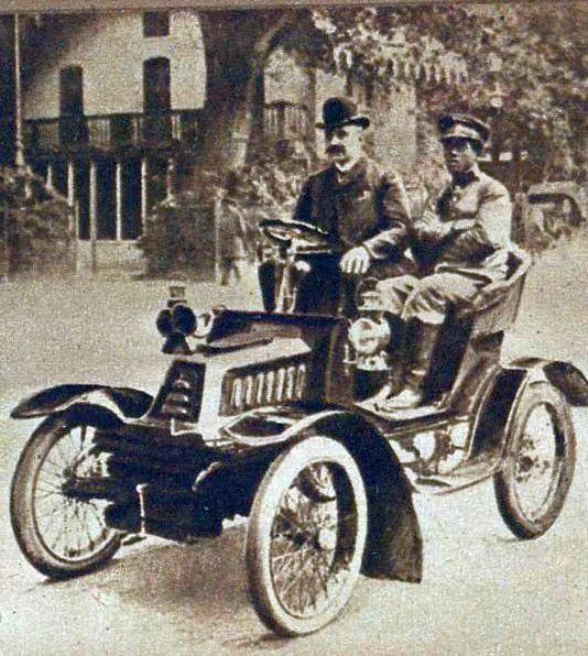 Le marquis de Dion, sur voiturette 6HP.